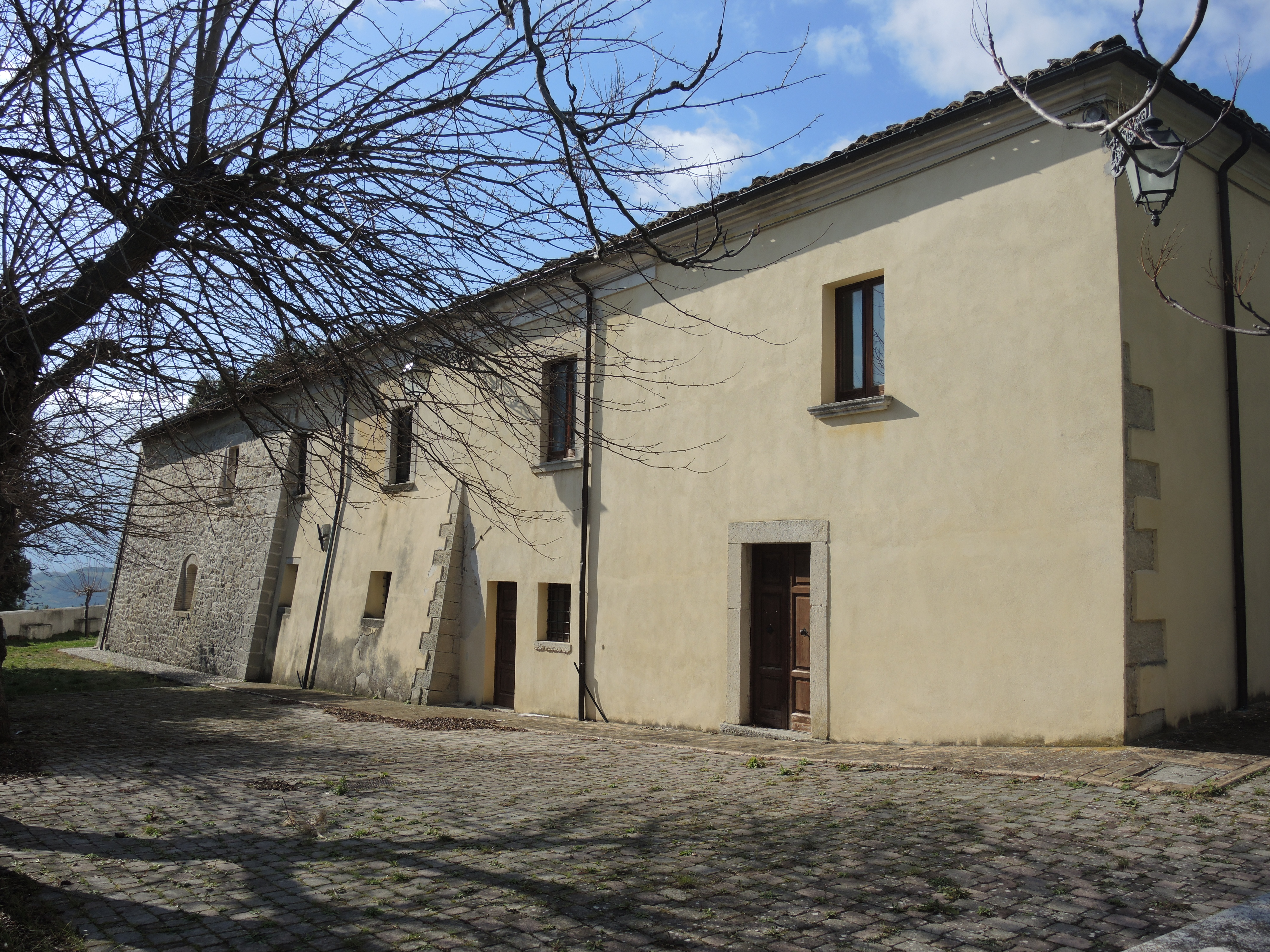 Pietranico: Oratorio di Santa Maria della Croce